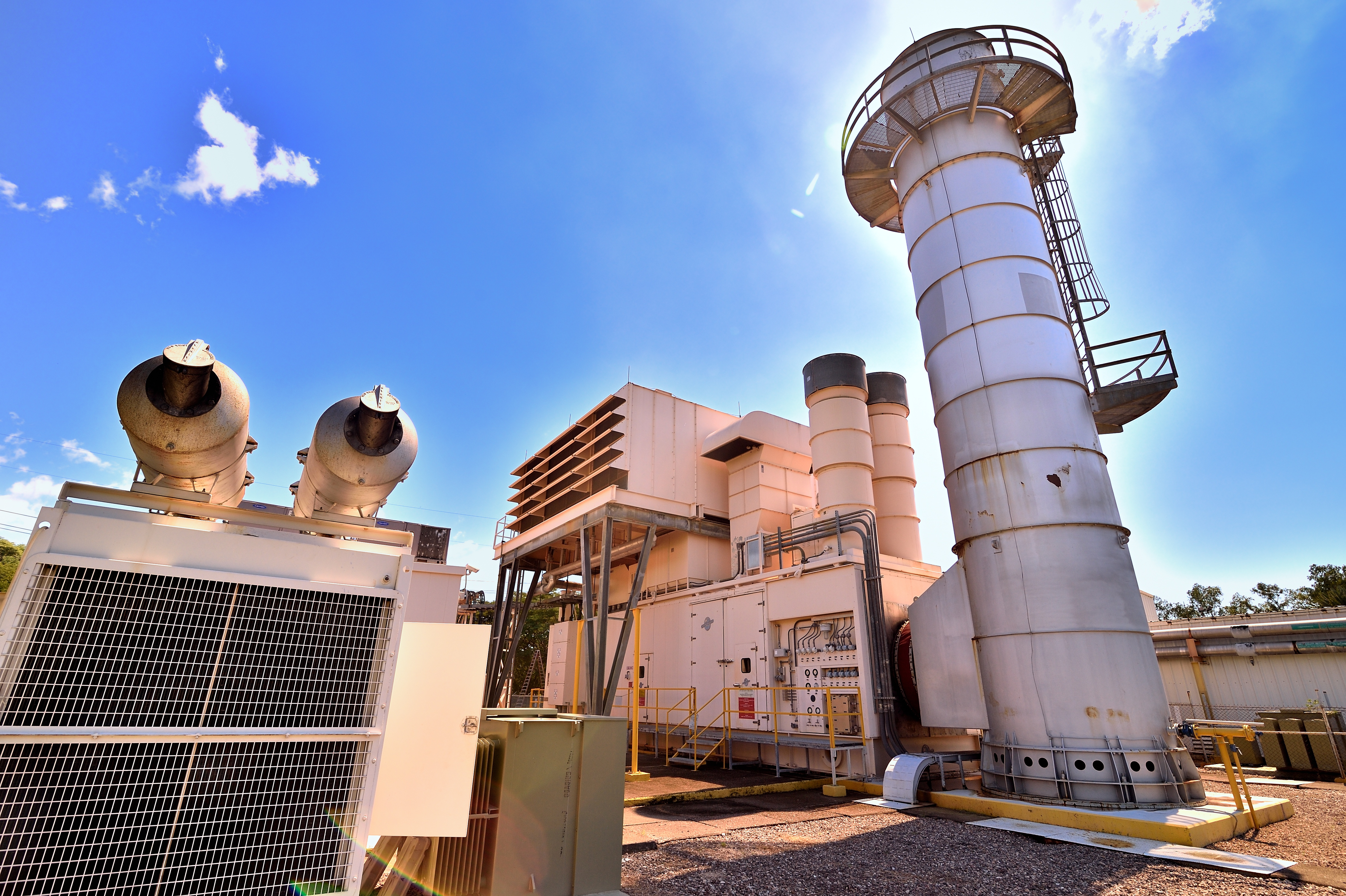 Planta de generación de energía eléctrica en Honduras, Pavana I, con capacidad de generación de 39.5MW